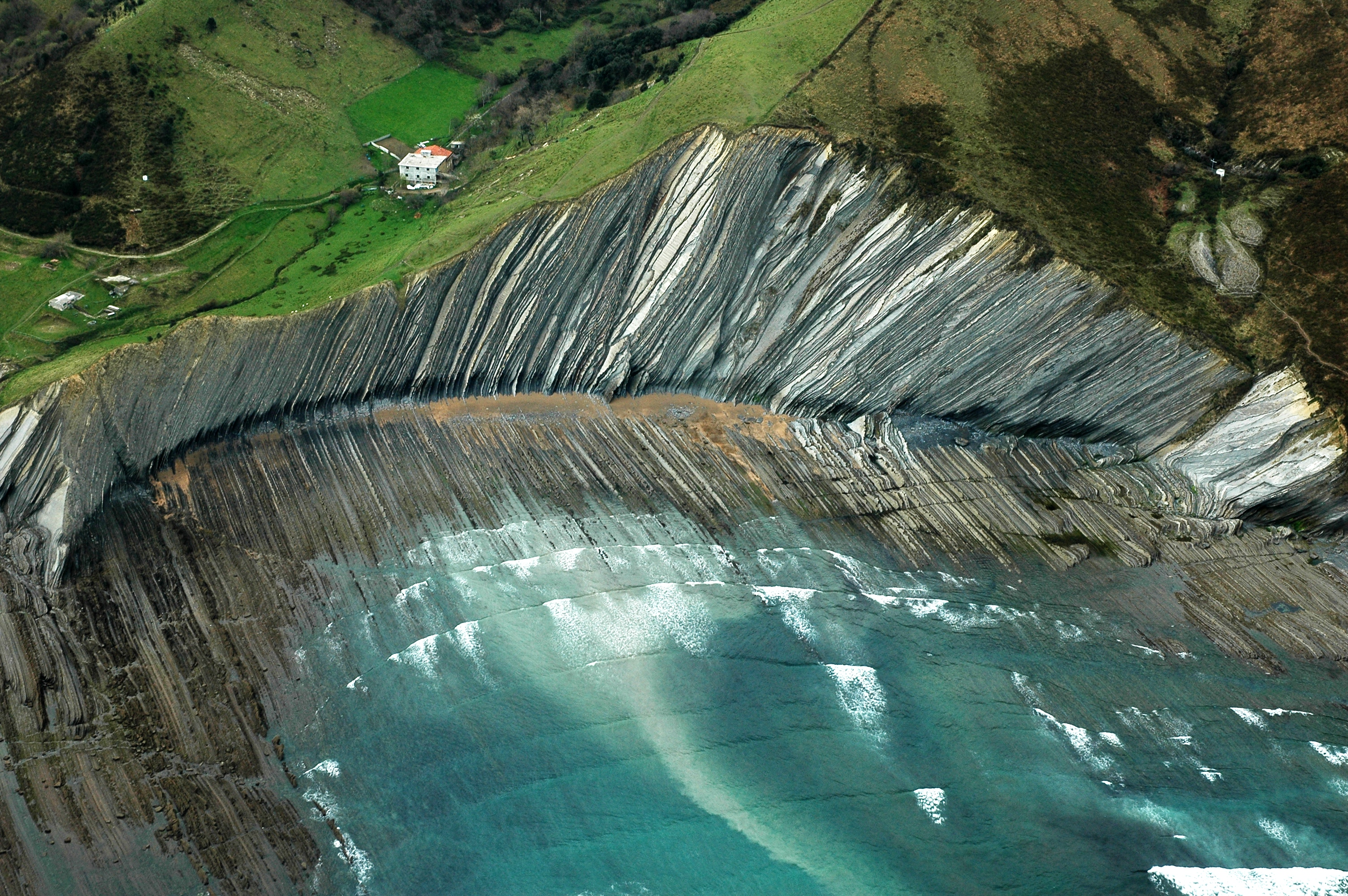 Sakoneta, Deban.